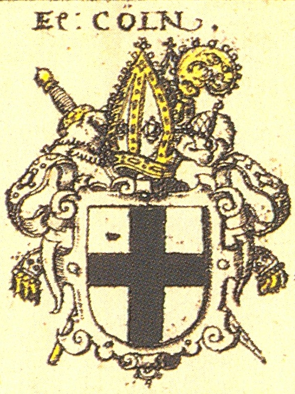 Wappen des Erzbistums Köln nach Siebmachers Wappenbuch